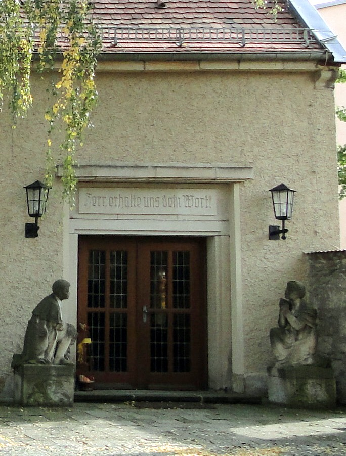 Zwei Figuren der 1945 zerstörten Ehrlichschen Gestiftskirche vor der Nazarethkirche in Dresden-Seidnitz